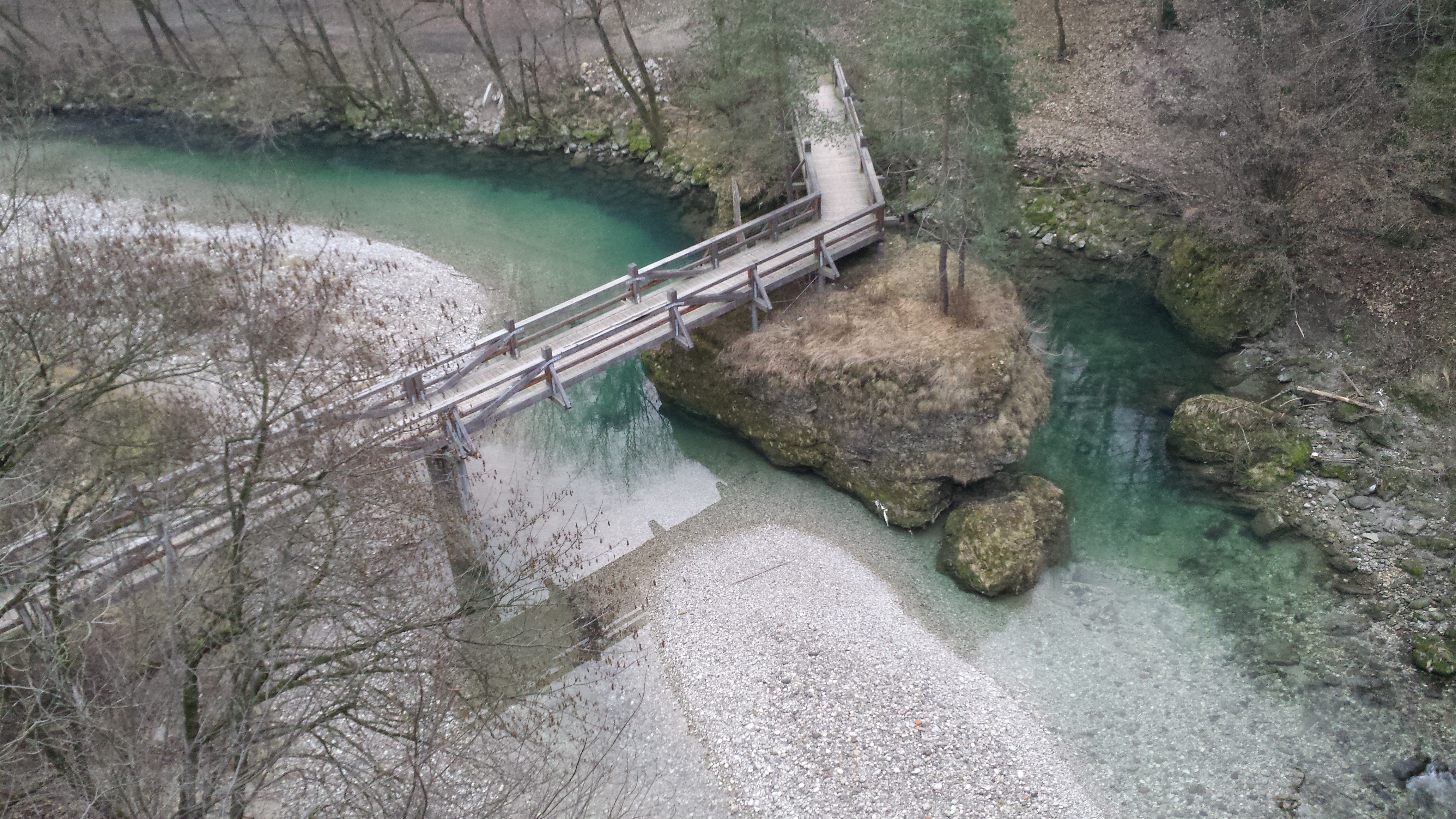 Reka Kokra v mestu Kranj preden se izlije v reko Savo. Posneto Januar 2016. Avtor: M. Mravlja